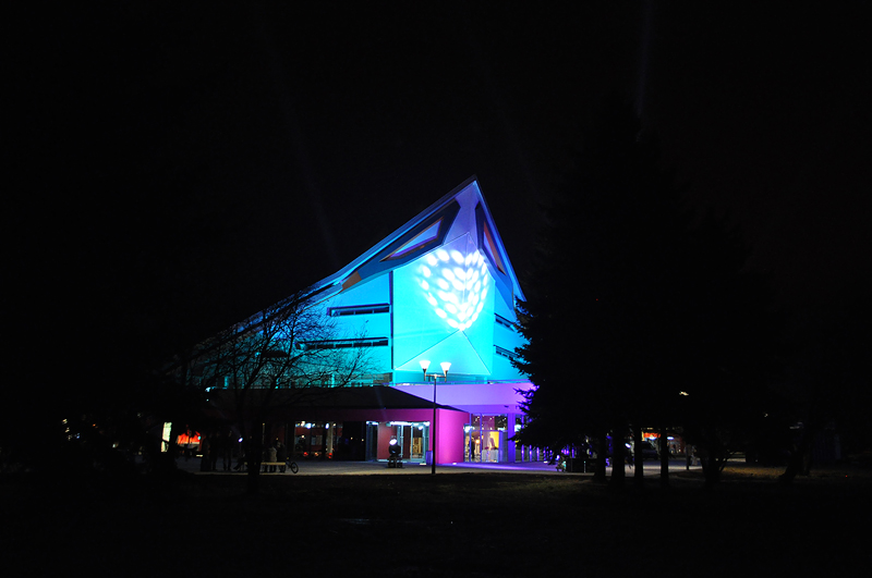 Centrum Sztuki Mościce w nocy